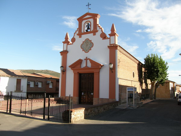 vista exterior de la Ermita del Santísimo Cristo de la Antigua